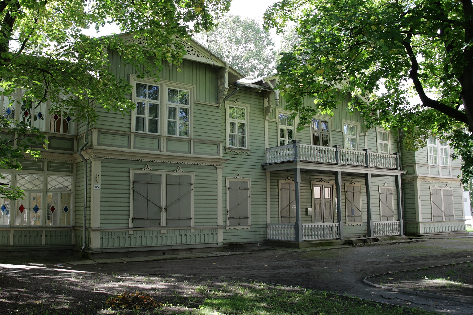 Elamu, 19. saj lõpp, kus aastail 1931-1940 elas Anton Hansen-Tammsaare